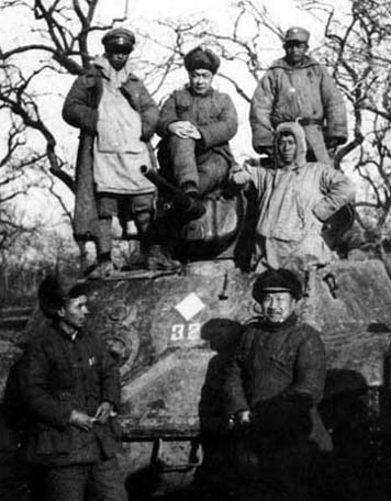 1947年1月鲁南战役后，新四军兼山东军区司令员陈毅和副司令员在缴获的坦克前留影